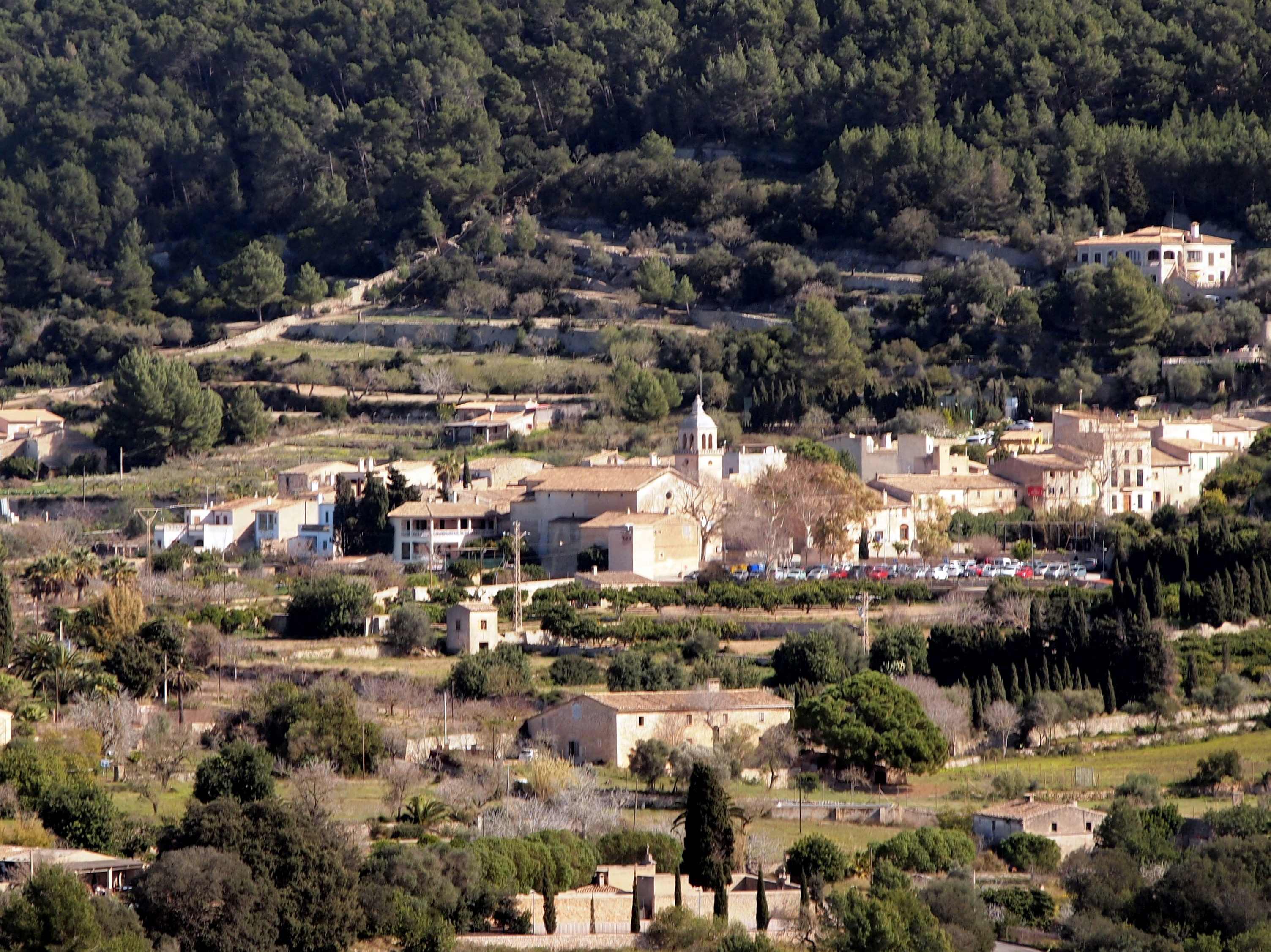 Llogaret de Randa (Algaida, Mallorca) des de la Serra de Galdent.